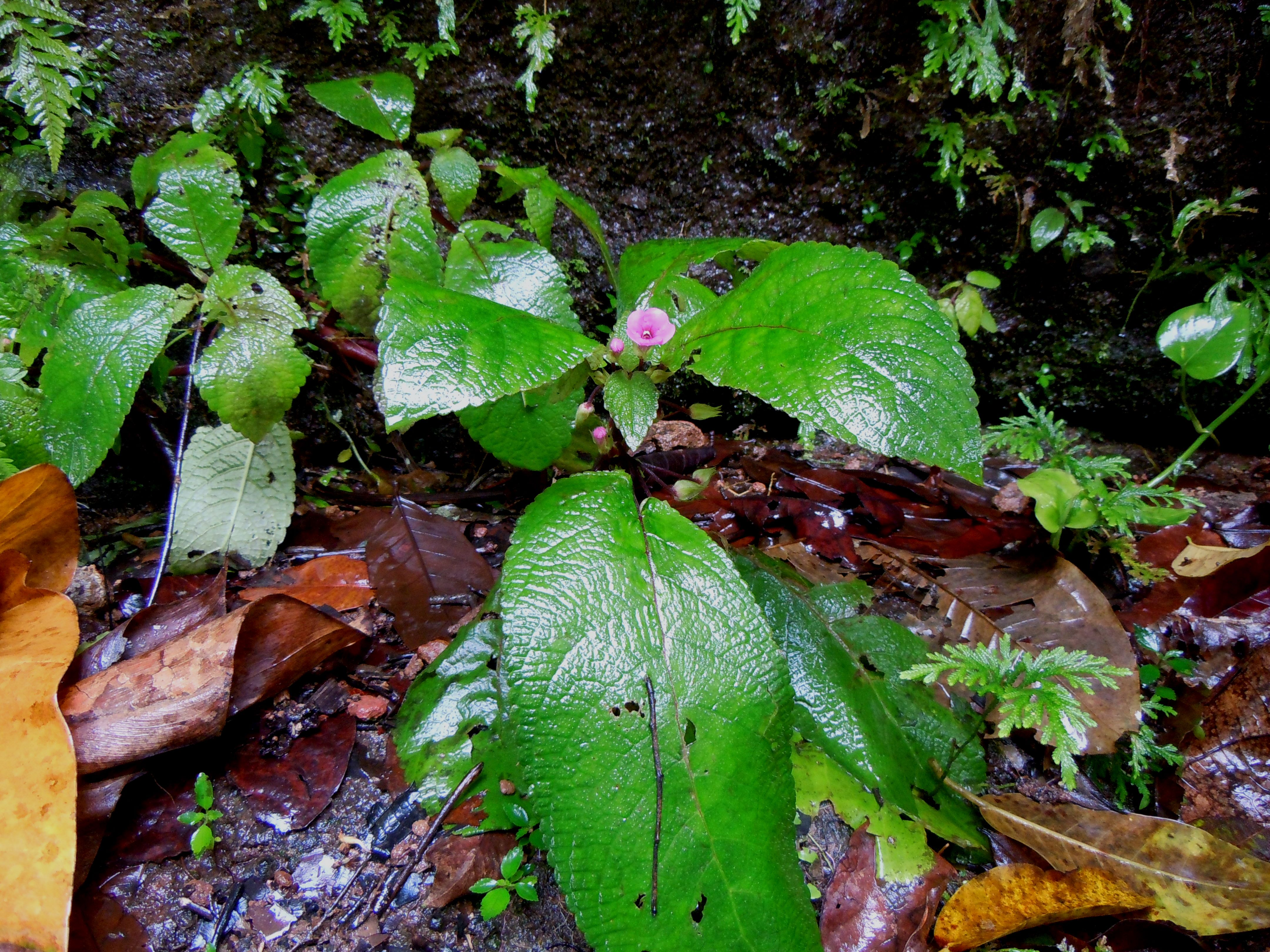 Nautilocalyx melittifolius - Guadeloupe